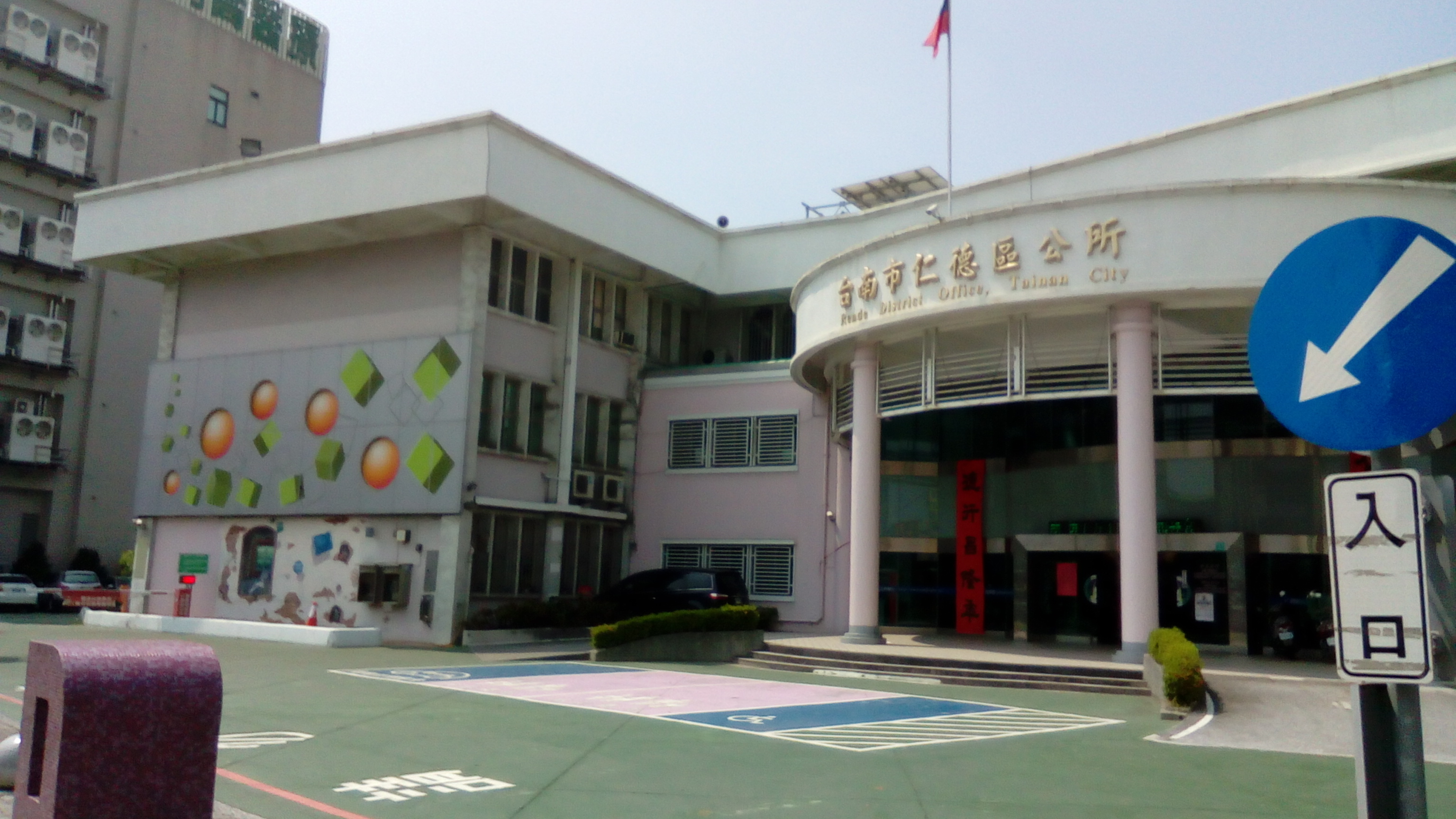 同上